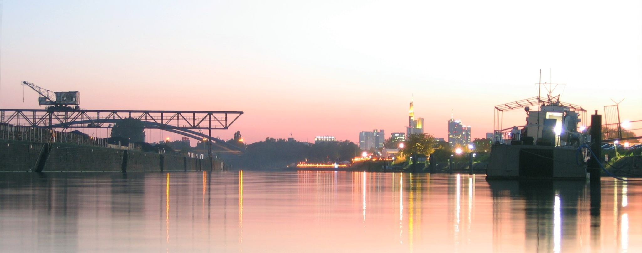 Offenbach, Hafenbecken, im Hintergrund die Frankfurter Skyline; Offenbach harbour